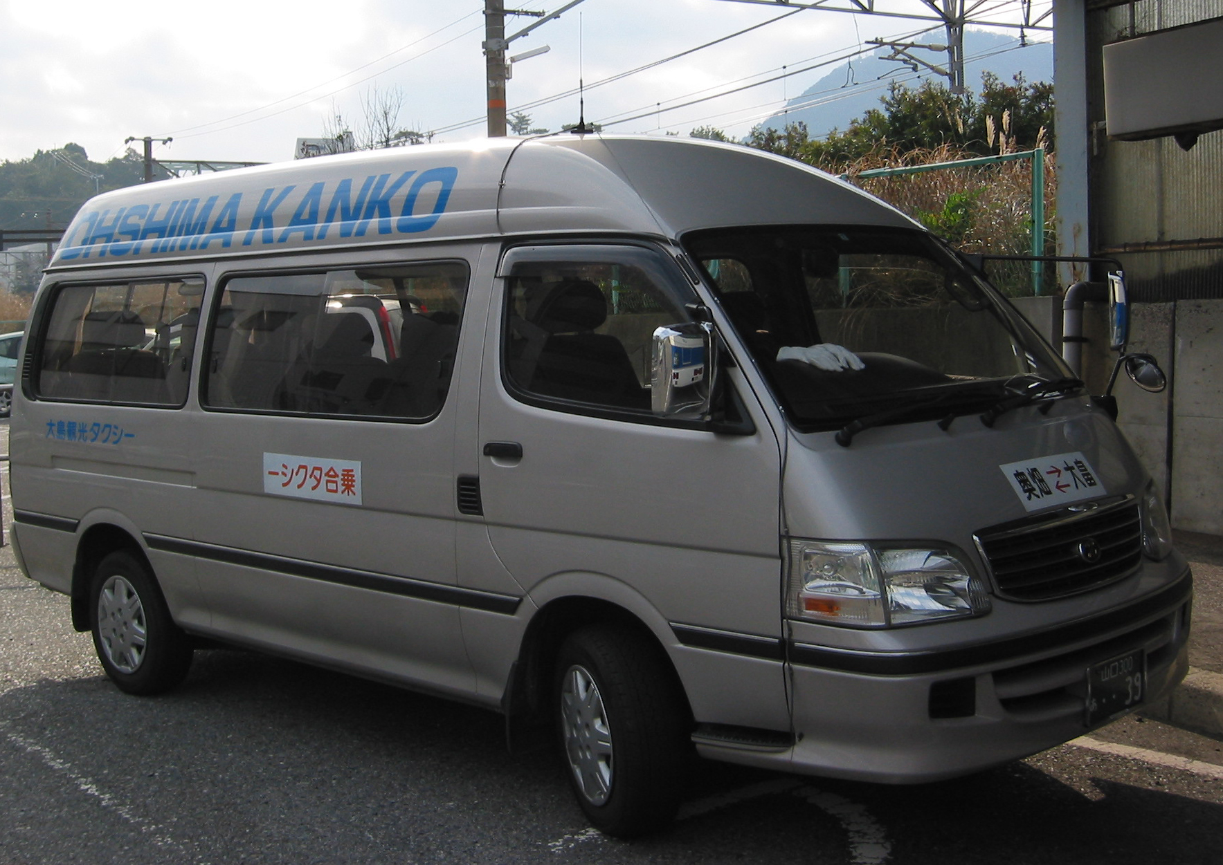 大島観光タクシー（山口県） 乗合タクシー奥畑線の車両